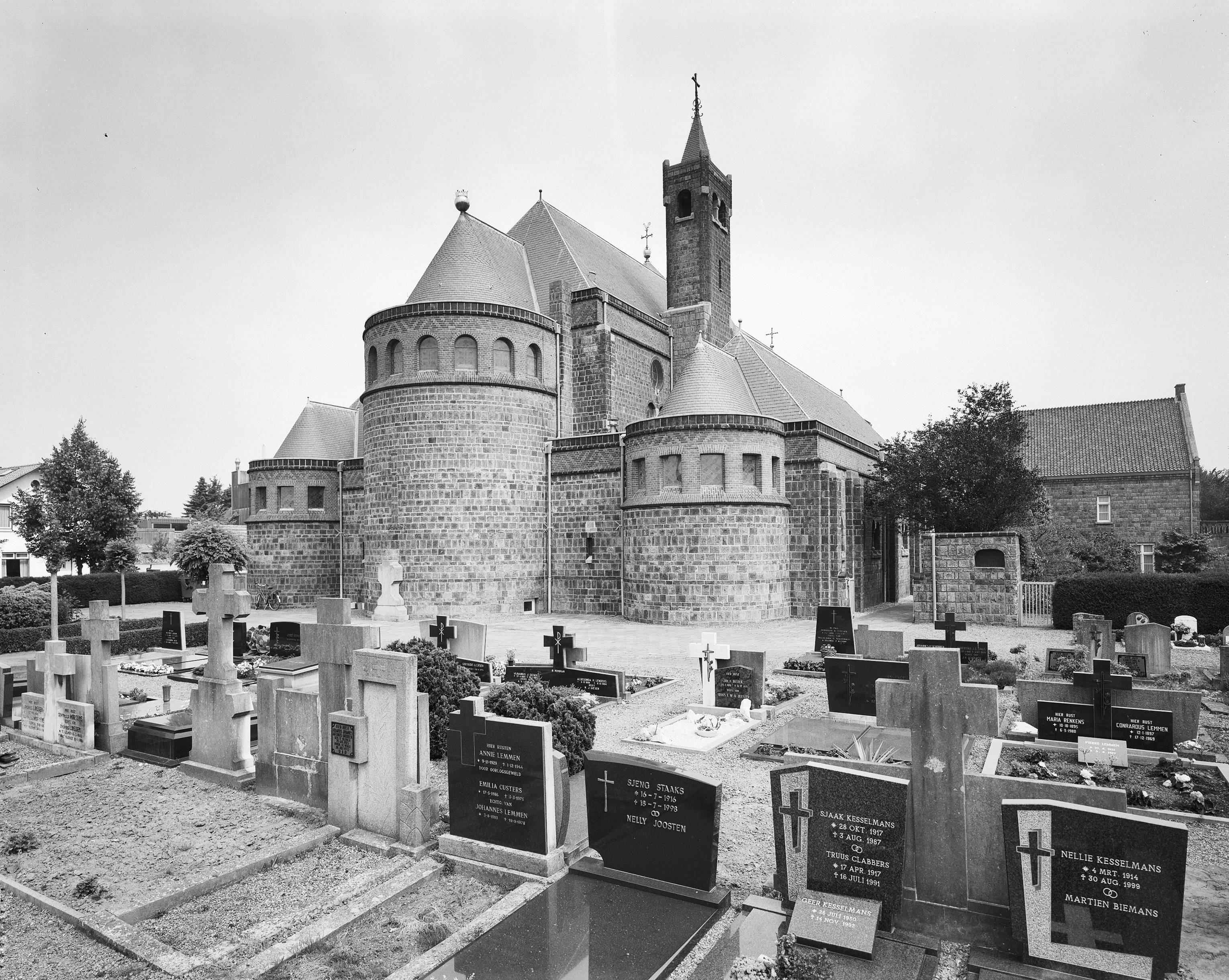 Sint Josephkerk: Overzicht noordoostgevel met kerkhof op de voorgrond (opmerking: Gefotografeerd voor Monumenten In Nederland Limburg)